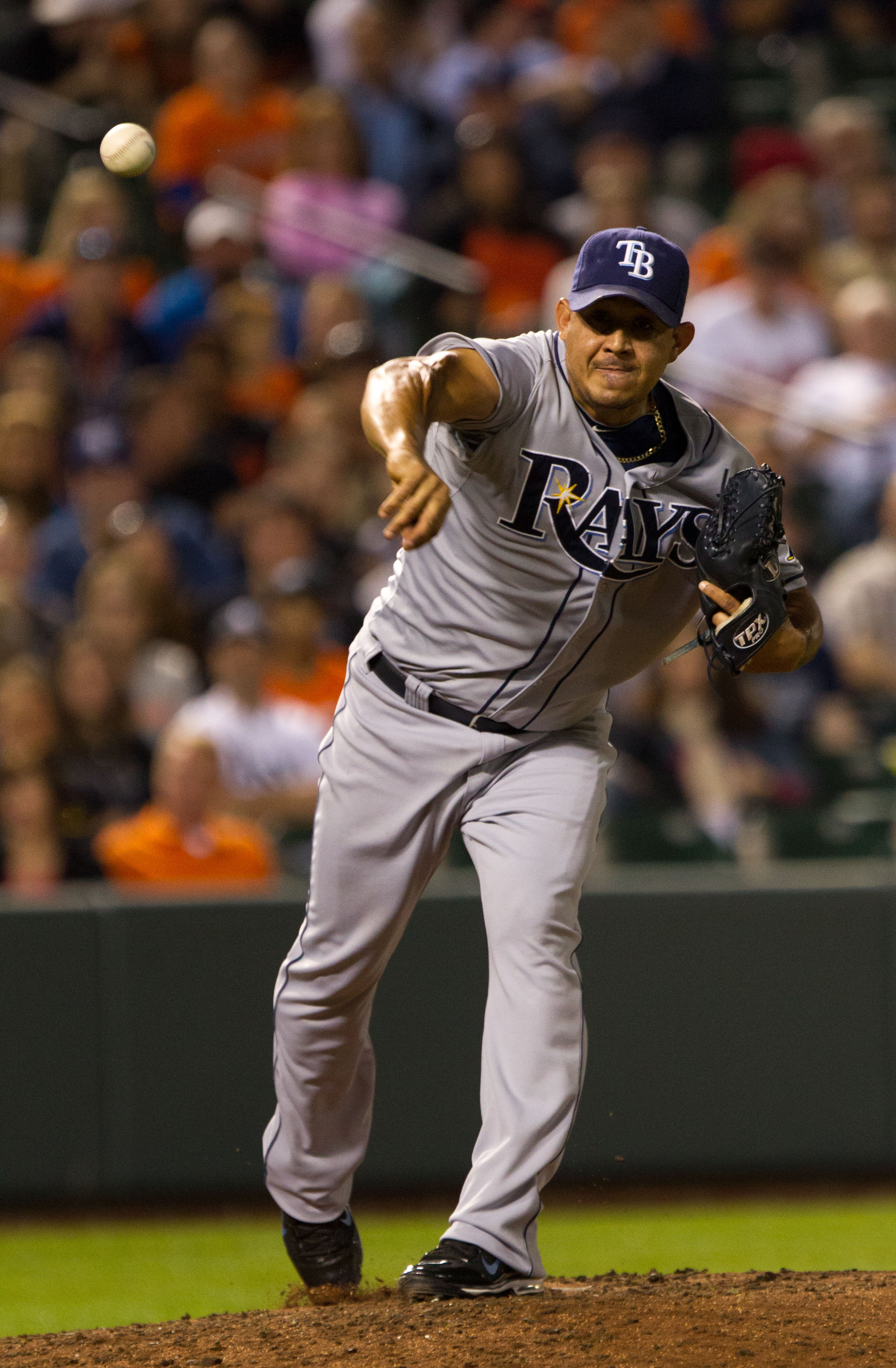 Joel Peralta